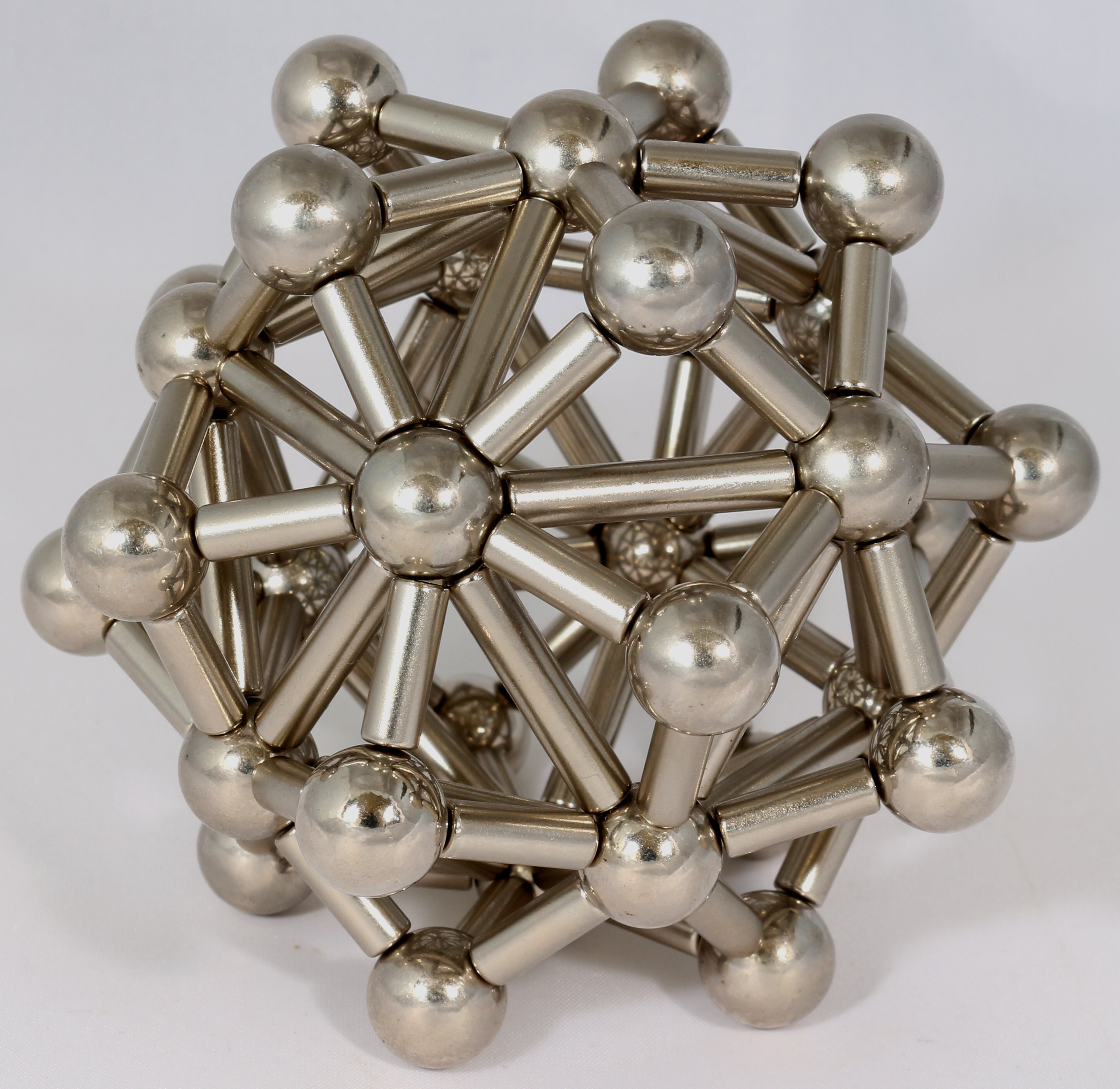 Ikosaeder bestehend aus 12 Stahlkugeln (d=13 mm) und 30 NdFeB Magnetstäben (d=5mm, l=25mm) - dazu, in jedem der 20 Seitenelemente des Ikosaeders, eine Dreiecks-Pyramide mit zusätlich 1 Stahlkugel (d=13 mm) und 3 NdFeB Magnetstäben (d=5mm, l=14mm) zur Stabilisierung. In Summe also 32 Stahkugeln, 30 lange und 60 kurze Magnetstäbe.